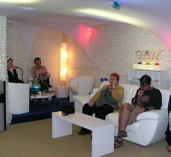 Intérieur d'un bar à oxygène français